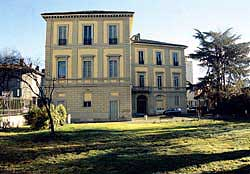 Palazzo storico di Vigevano, sede della Civica Biblioteca